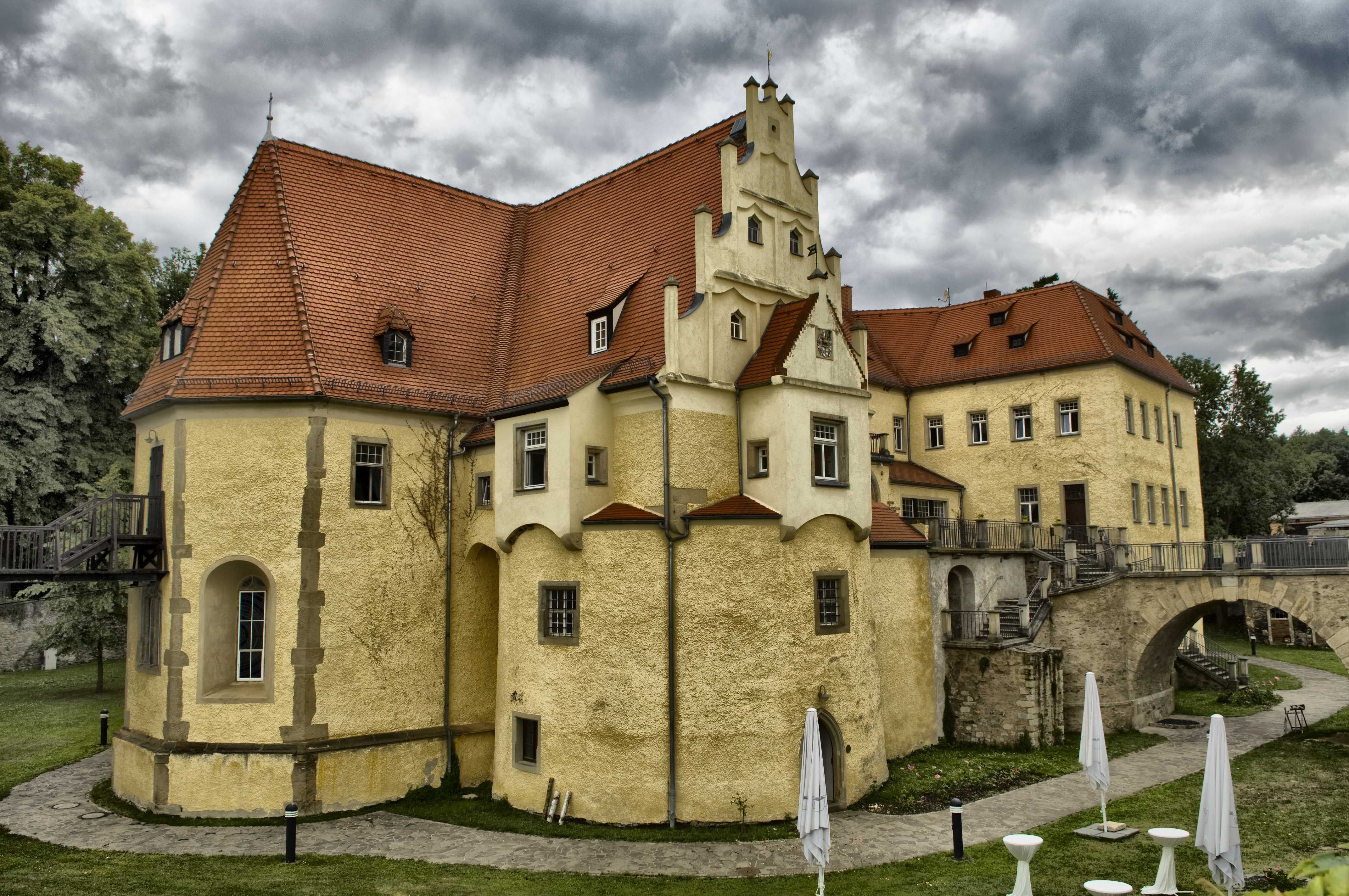 Südfassade von Schloss Schleinitz bei Leuben-Schleinitz mit Kirche